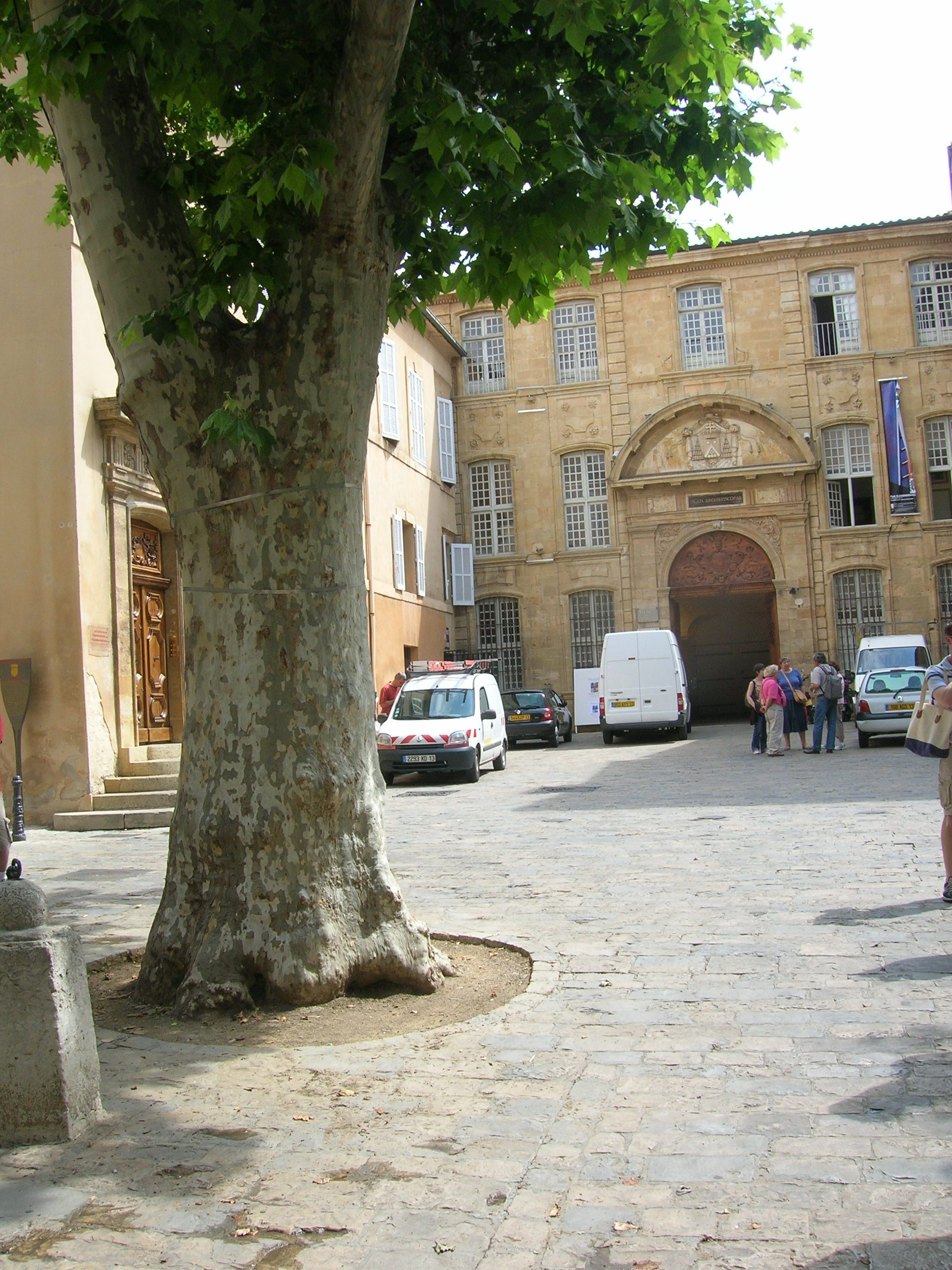 Aerzbeschofspalais, Aix-en-Provence.